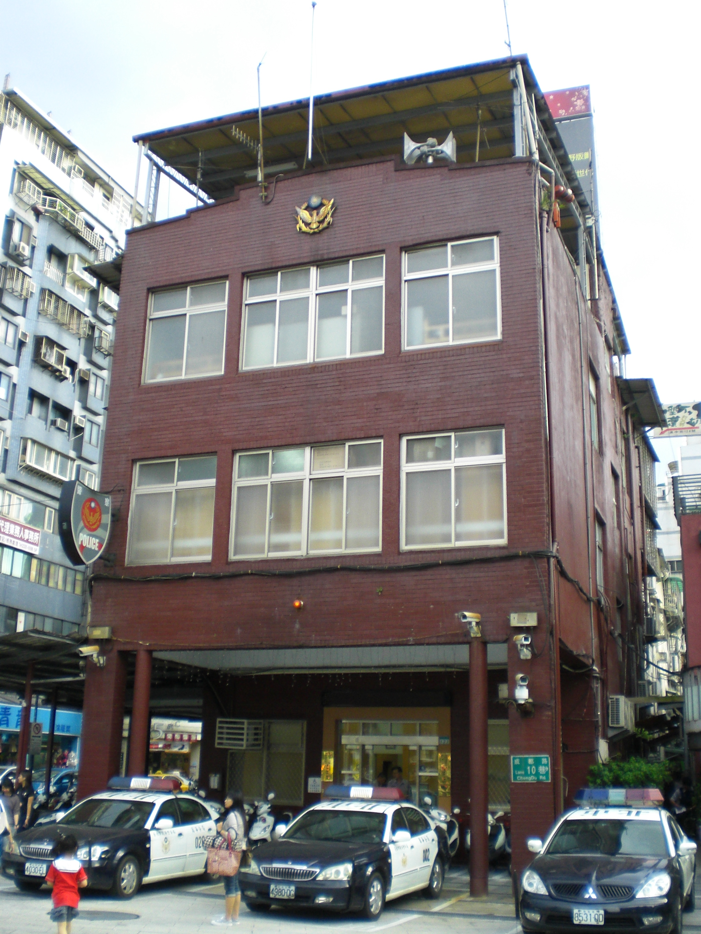 中文（台灣）: 臺北市政府警察局萬華分局漢中街派出所，位於臺北市萬華區漢中街122號。